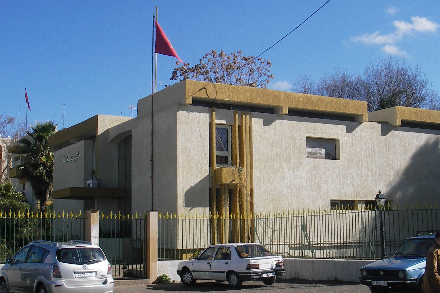 Mairie d'El Hajeb depuis avenue Hassan II (Maroc)